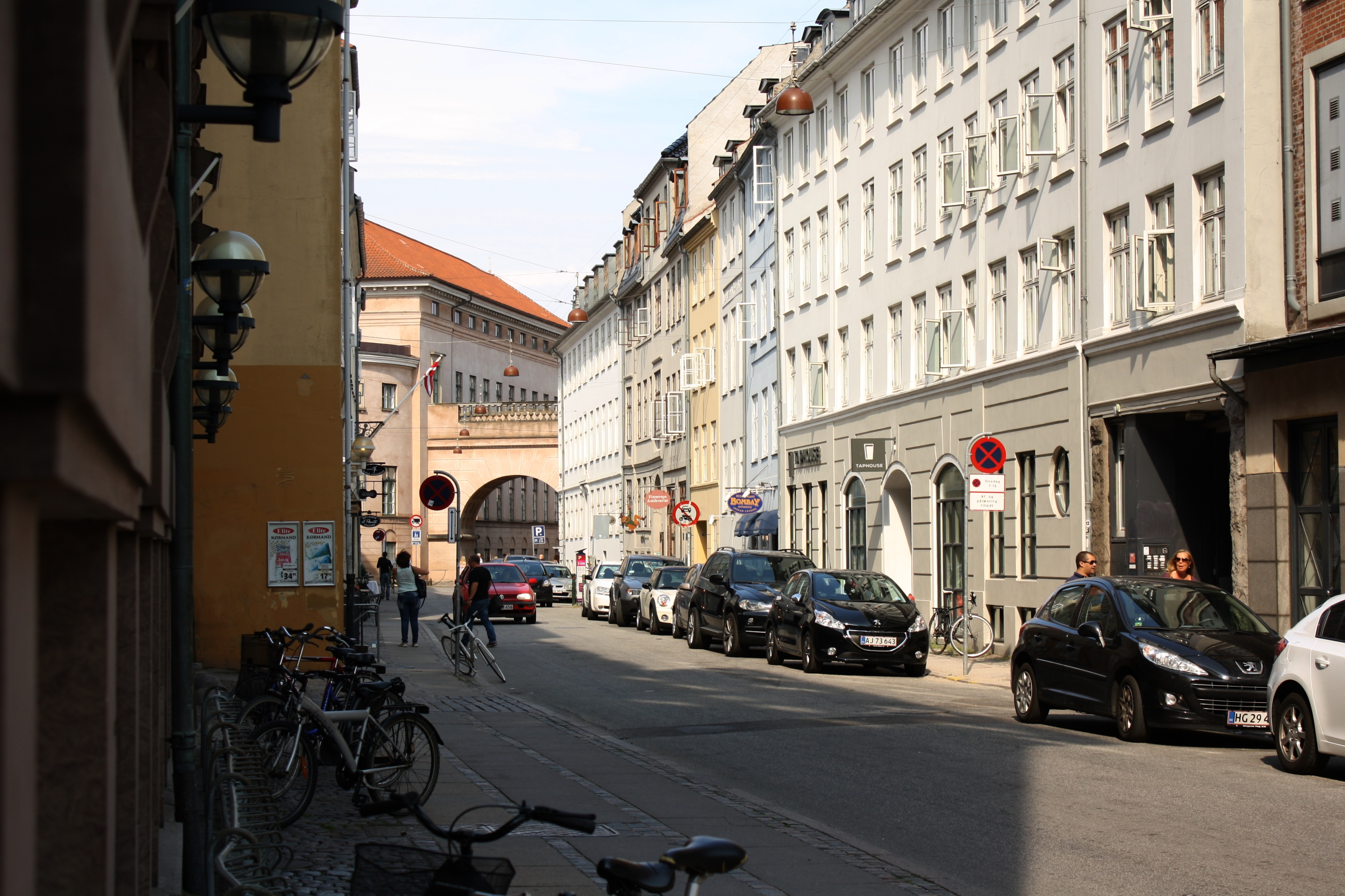 Lavendelstræde in Copenhagen, Denmark